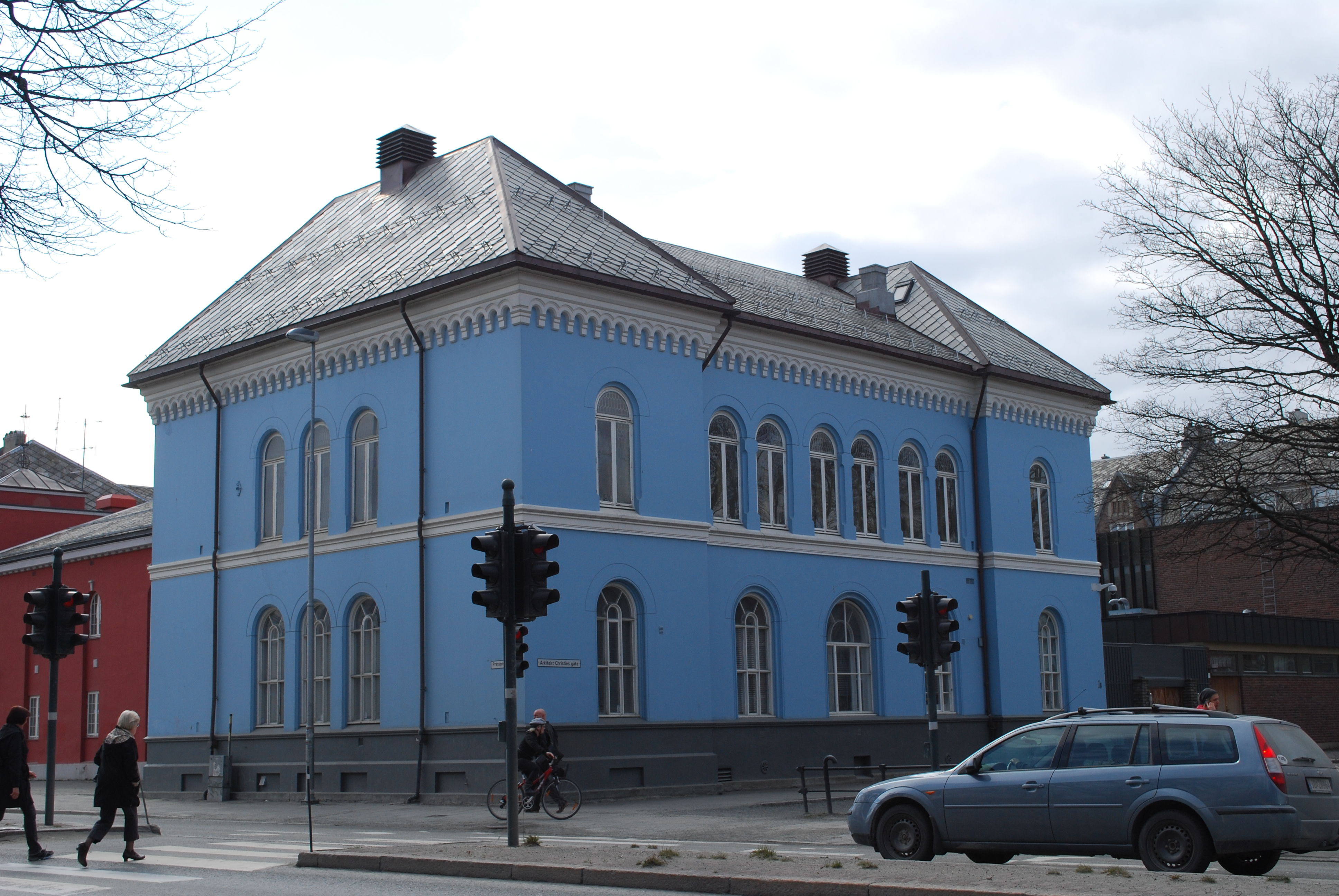 Det jødiske museum i Trondheim